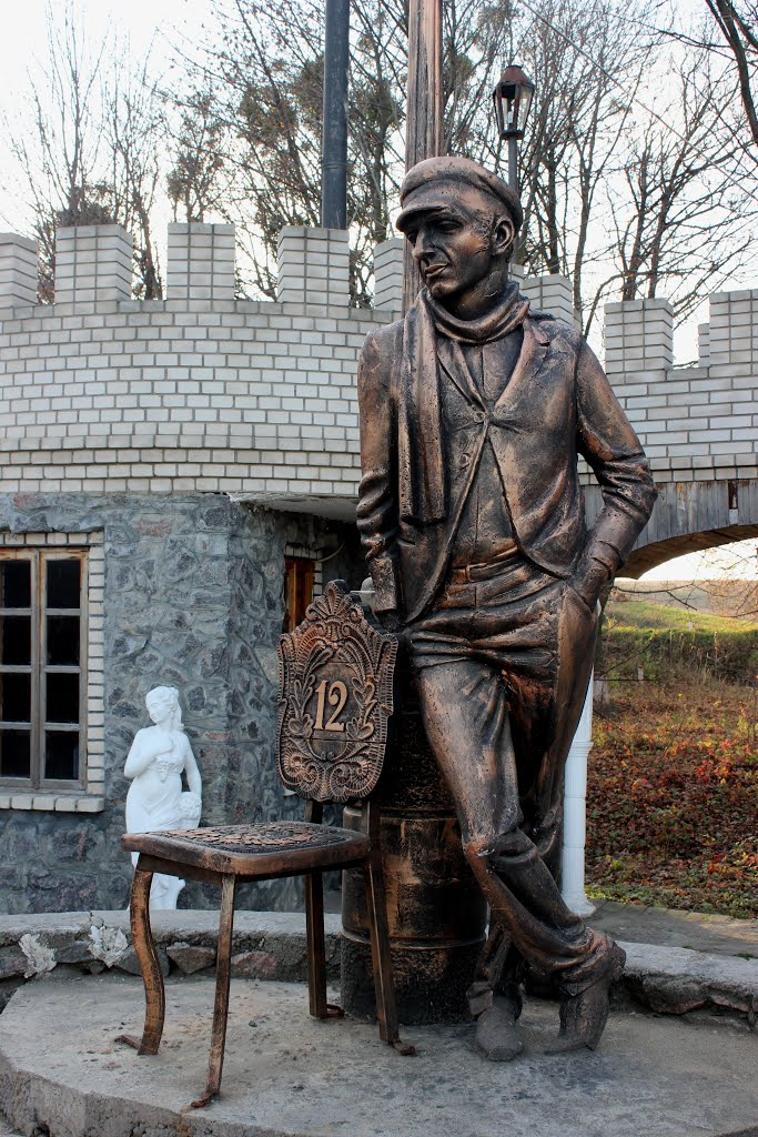 Памятник Остапу Бендеру